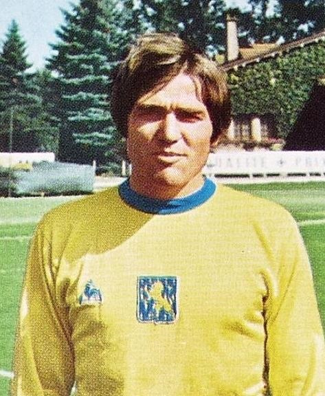 Georges Lech (1970, FC Sochaux), 'Ageducatifs 1970 - 1971', Panini figurina n°262.